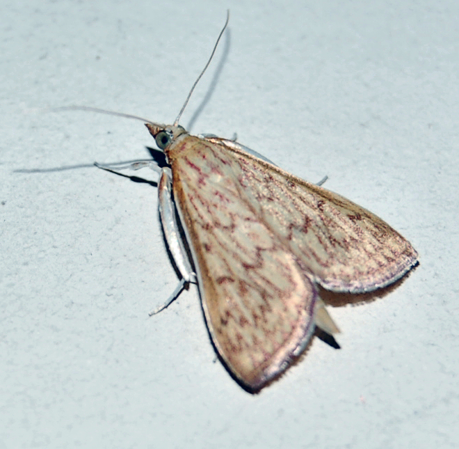 Ostrinia cf penitalis (Crambidae, Spilomelinae)